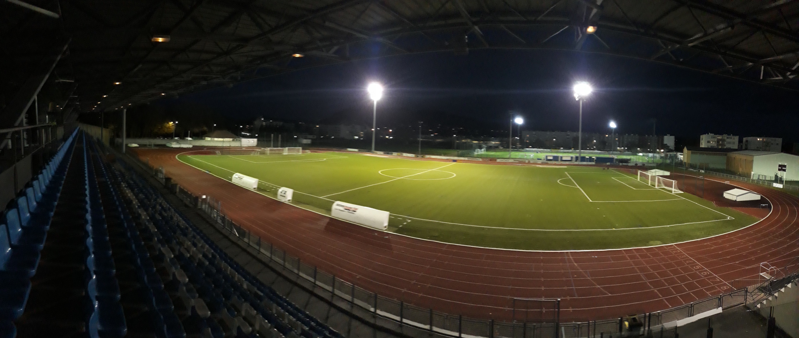 Stade René-Hologne de Vesoul - 27 novembre 2019